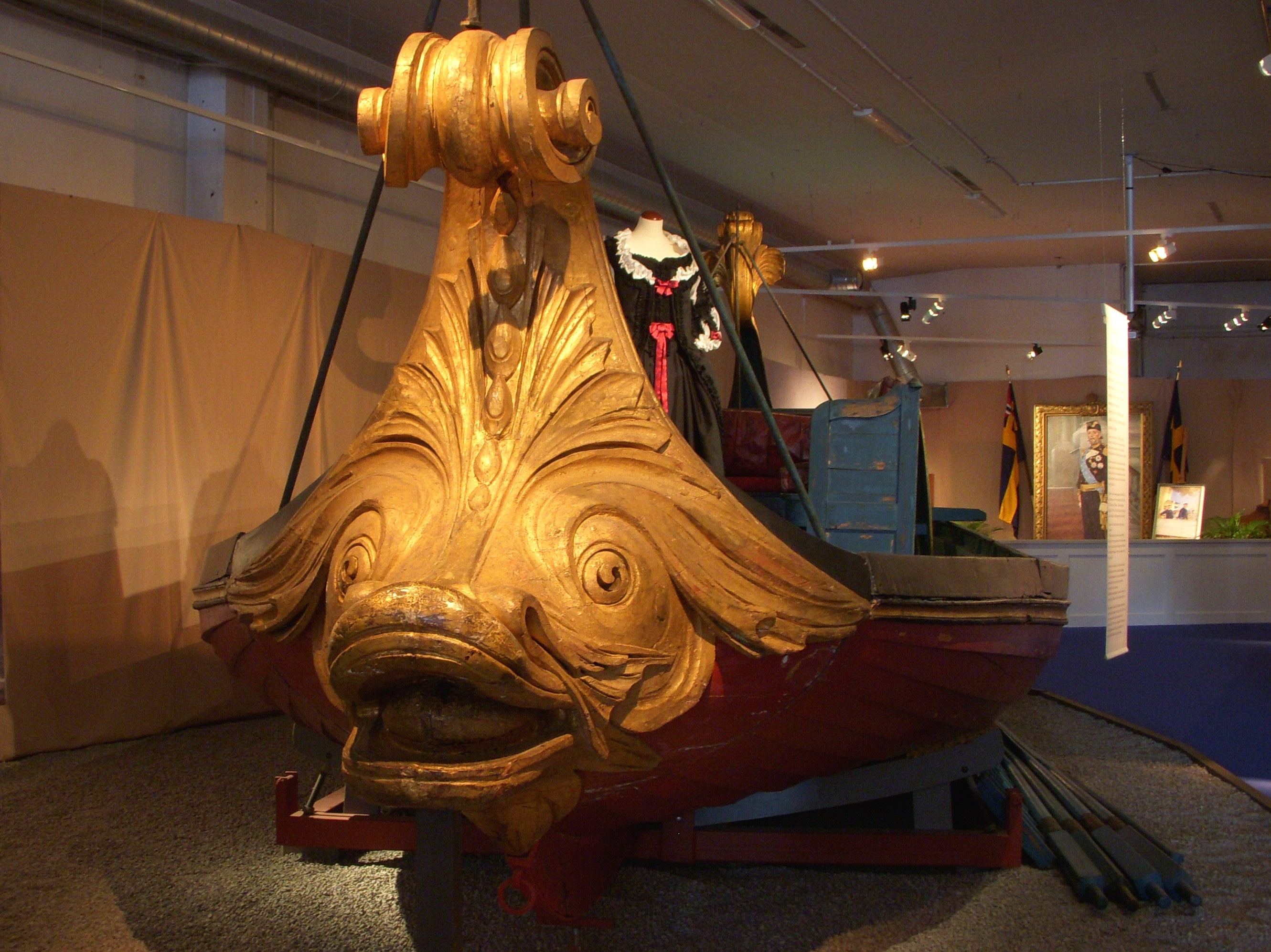 Gustav III:s lustbåt "Delfinen"